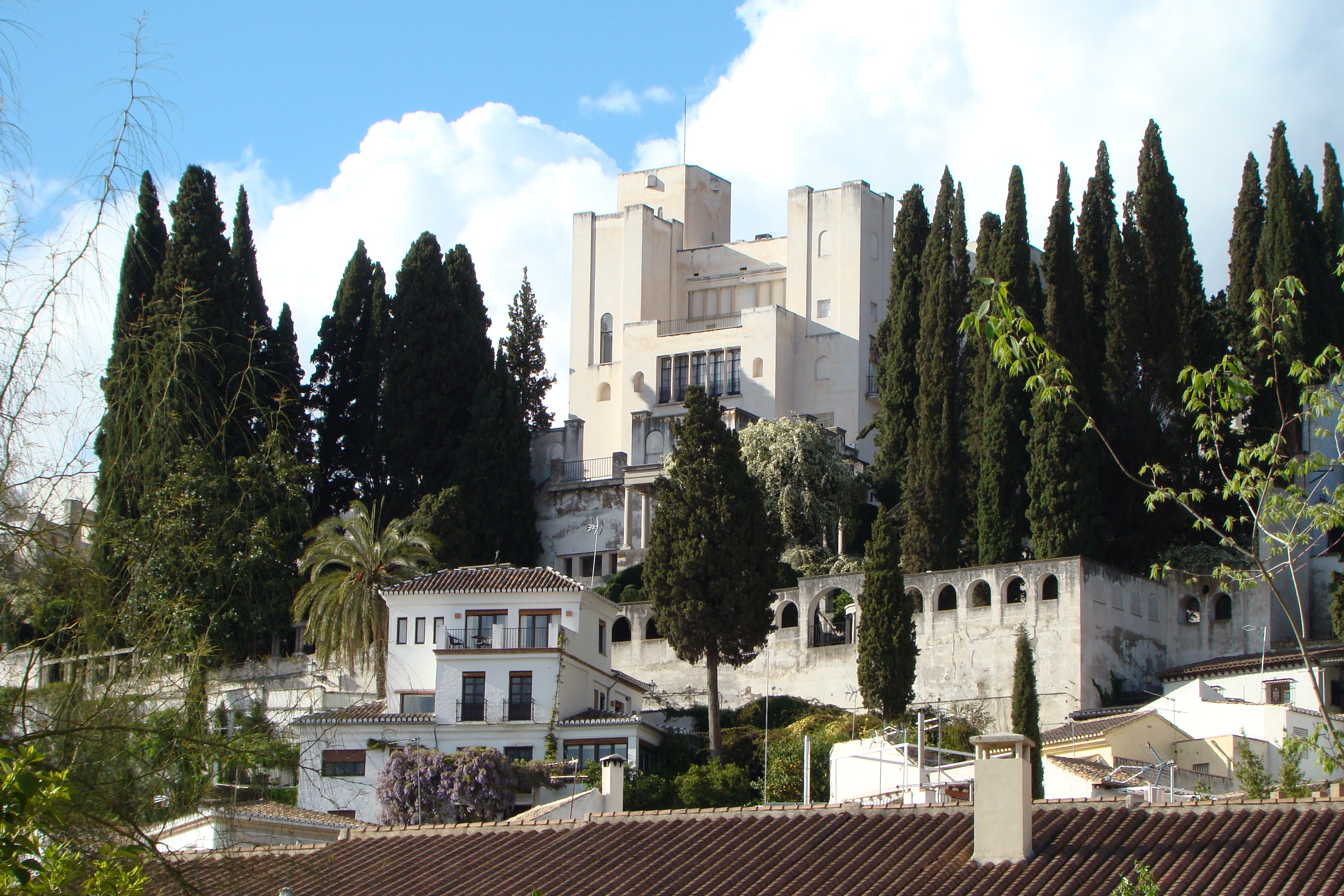 Carmen modernista en el barrio del Realejo de Granada (España)